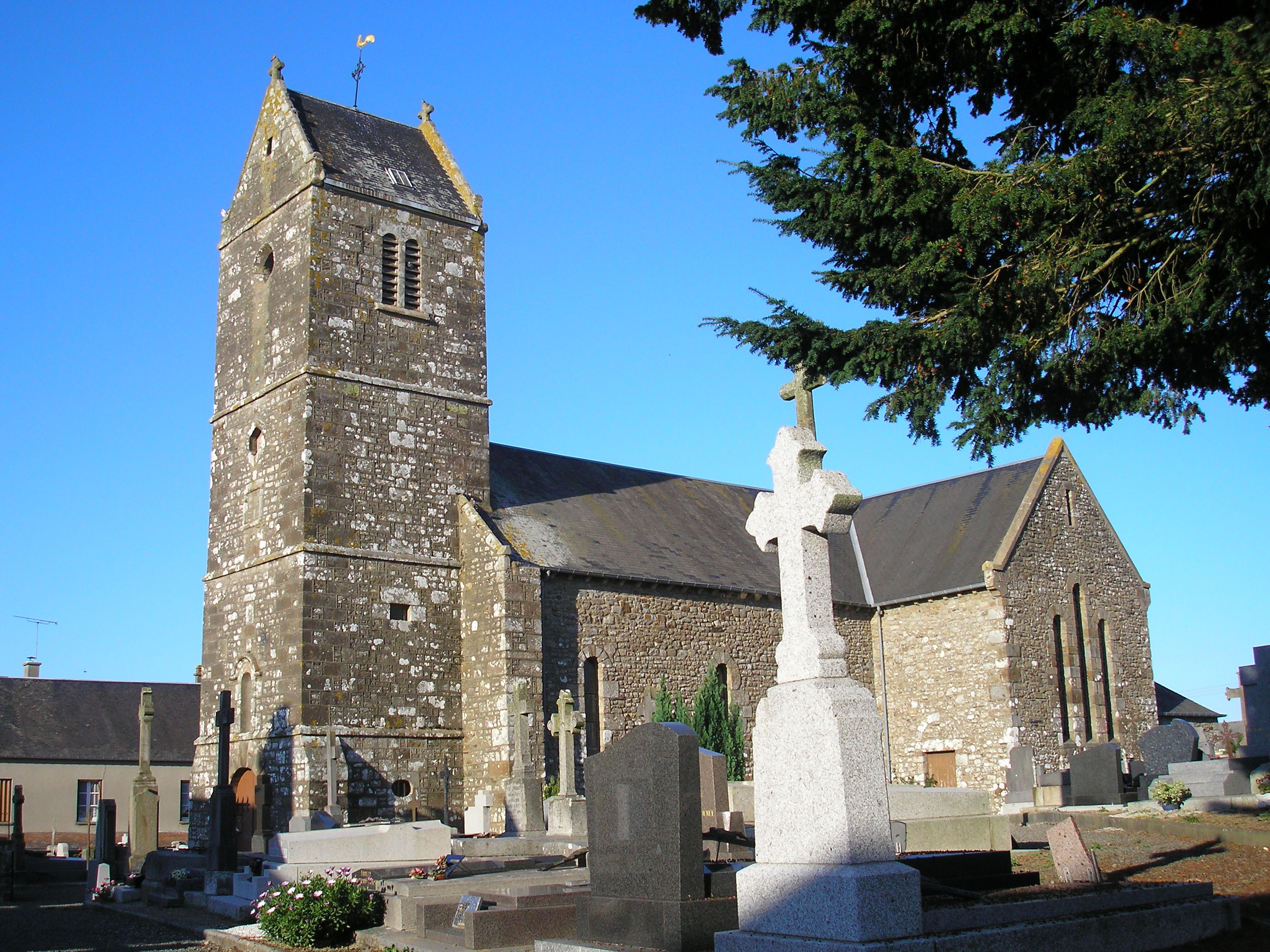 Isigny-le-Buat (Normandie, France). L'église Notre-Dame de Vezins.